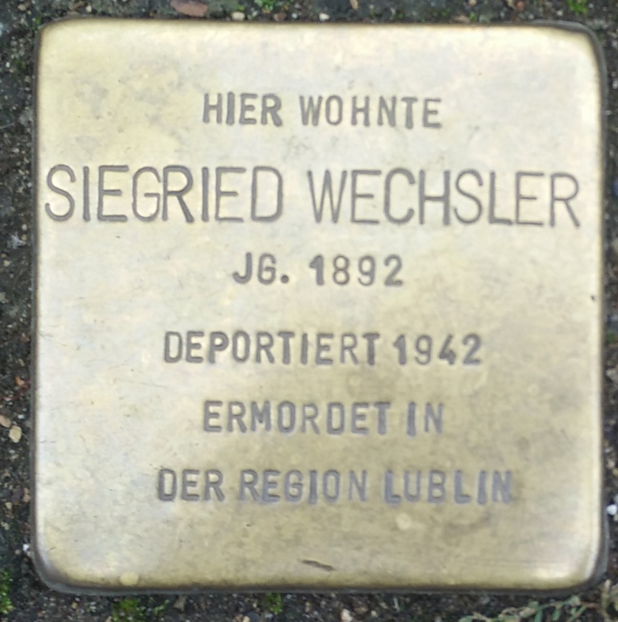 Bad Vilbel, Stolperstein Siegried Wechsler